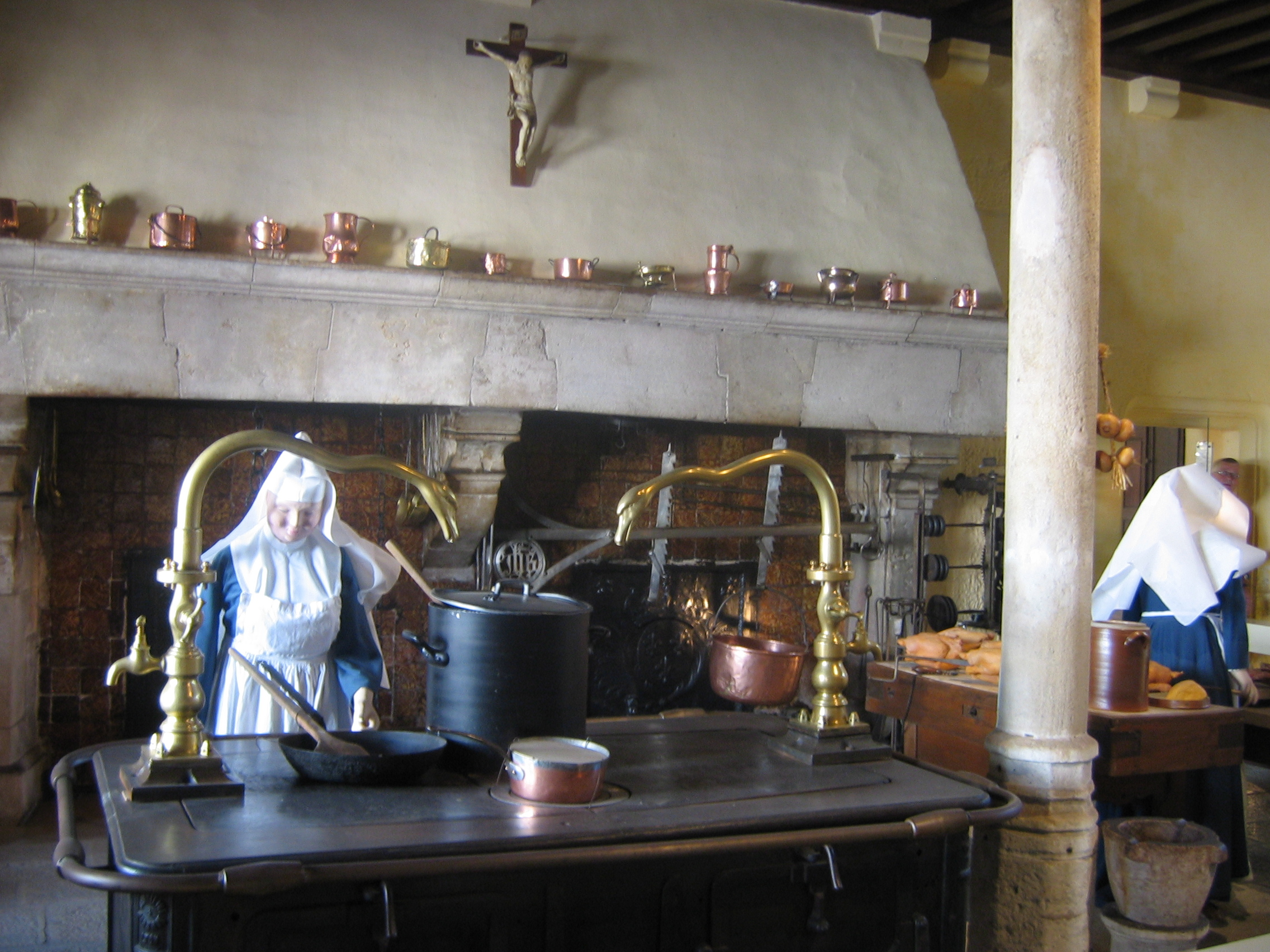 Hospices de Beaune, Bourgogne, France. cuisines.